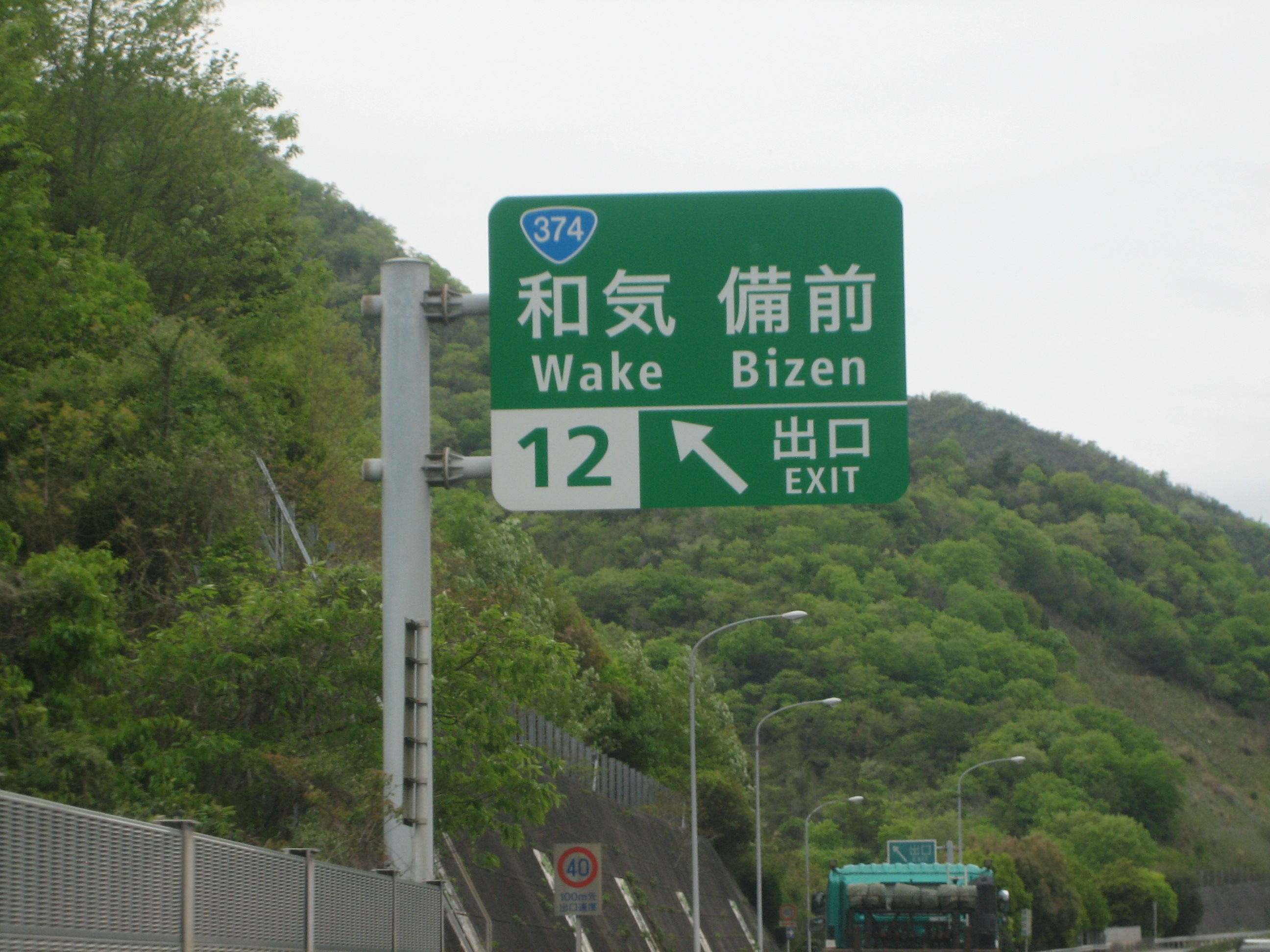 和気IC出口